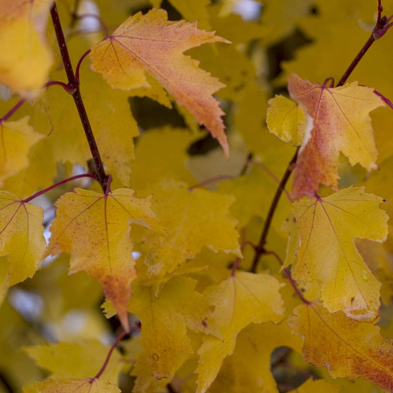 Golden Tree